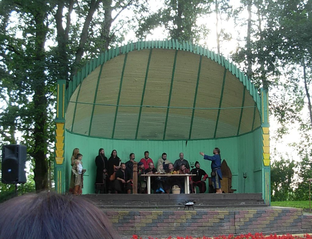 Inscenizacja postrzyżyn syna Piasta kołodzieja na półwyspie rzępowskim w Kruszwicy